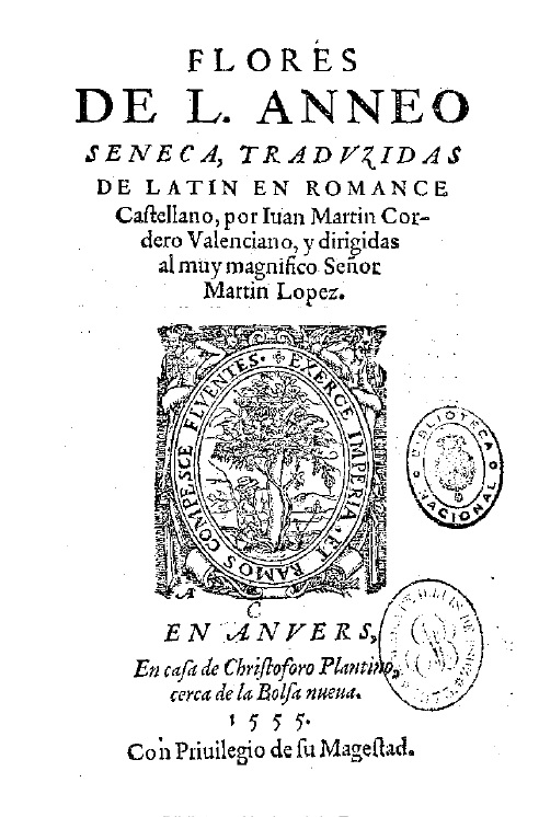 Portada de "Flores" de Sèneca, segons la versió d'Erasme de Rotterdam i la traducció al castellà de Joan Martí Cordero. En Anvers: En casa de Christoforo Plantino, 1555